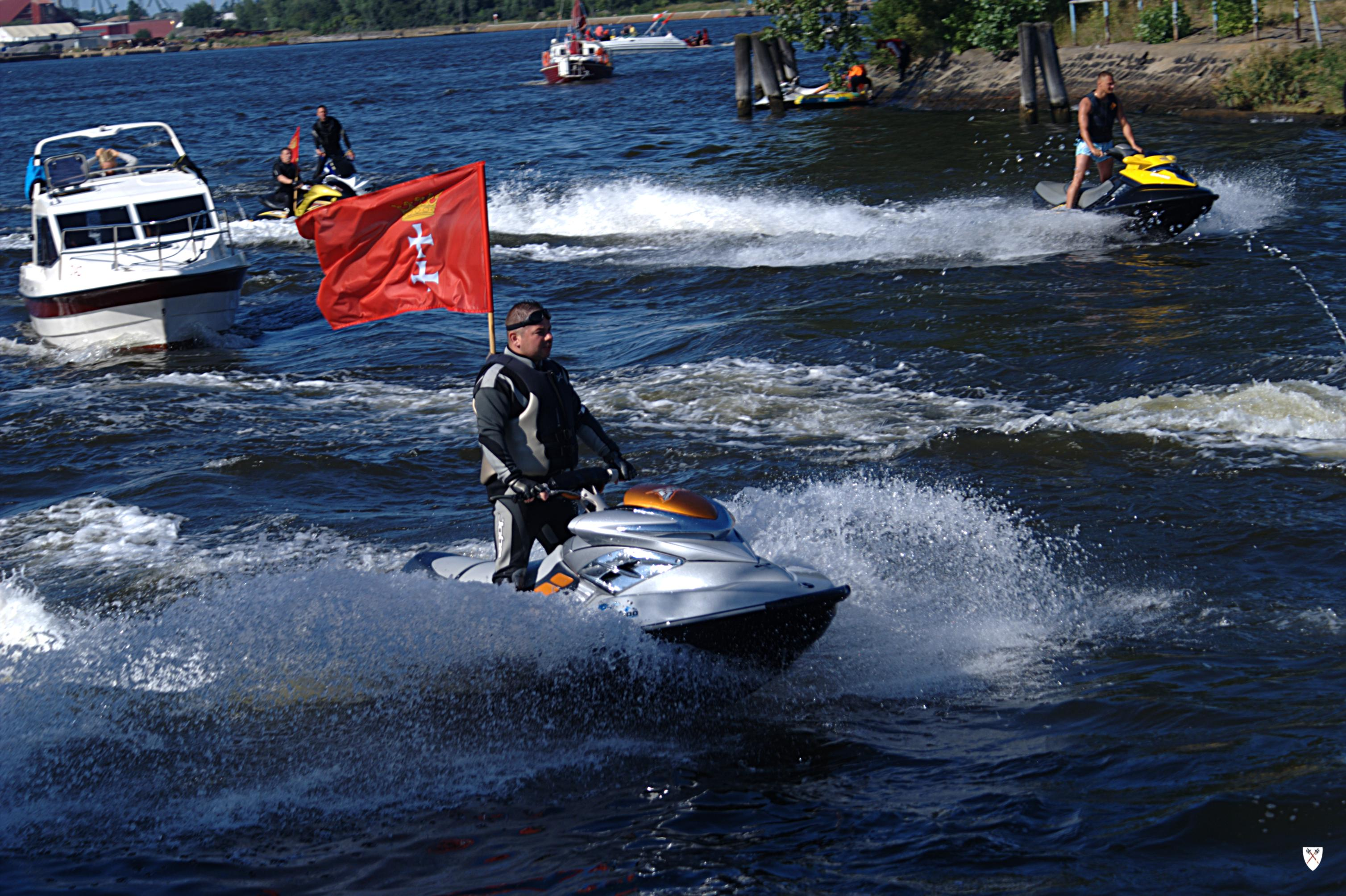 Skuter na Motławie w Gdańsku.